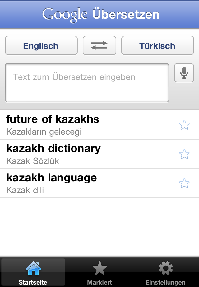 iOS жүйесіндегі Google Аудармашы қосымшасы